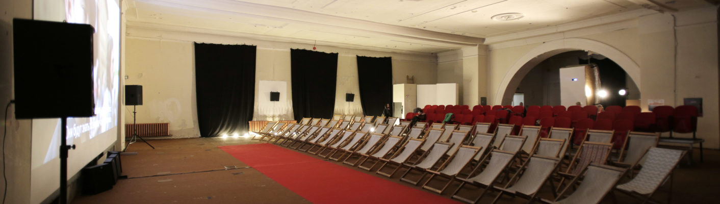 Tartu Elektriteateri saal.